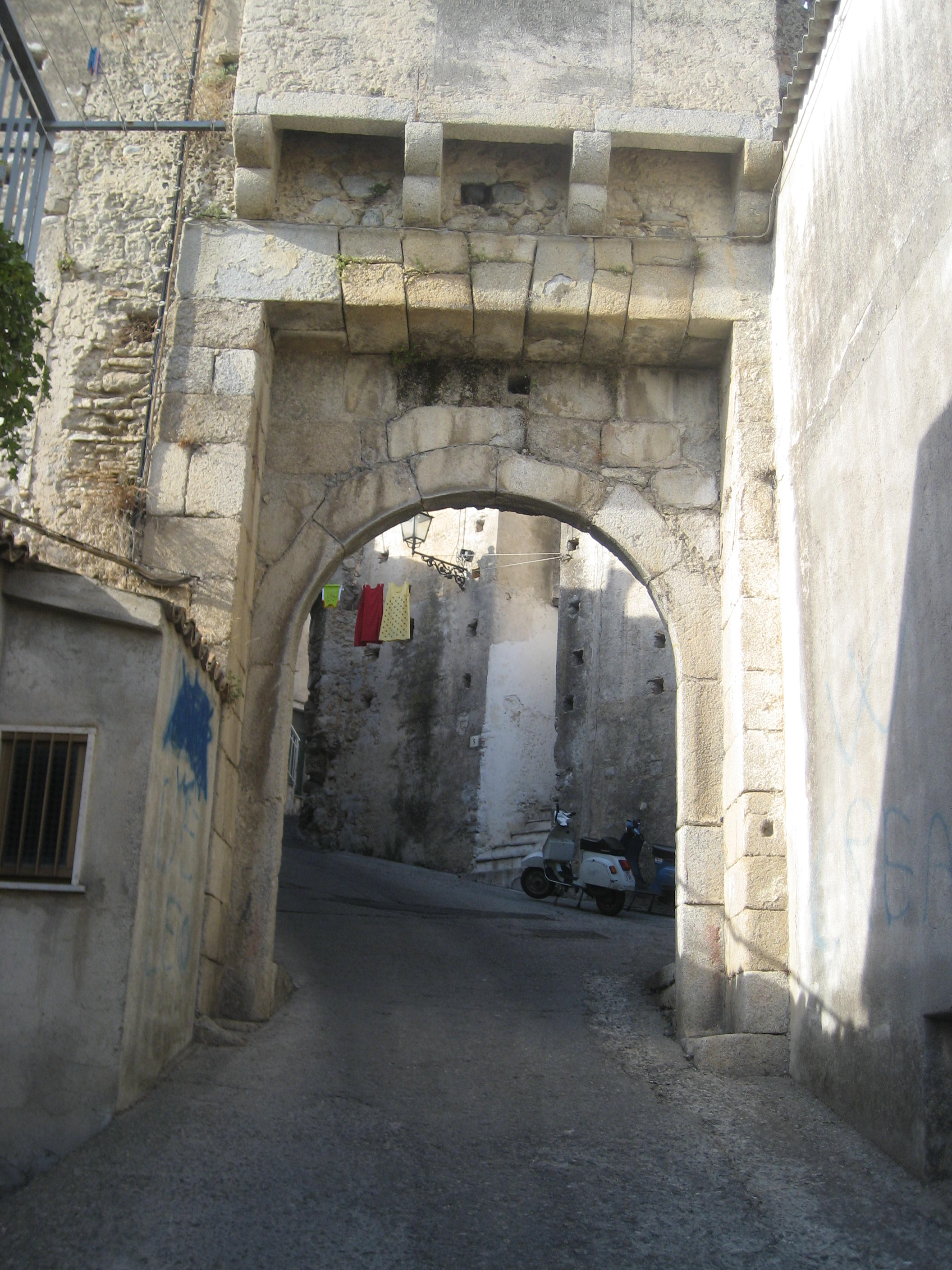 Entrata_castello di Monasterace